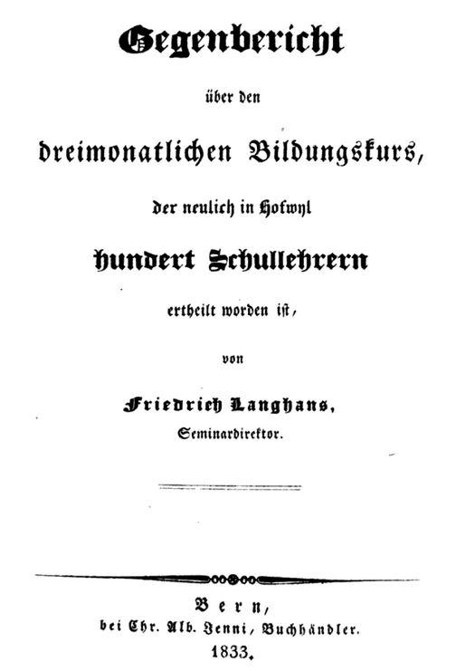 Gegenbericht von Friedrich Langhans, Seminardirektor Hofwyl BE, Schweiz